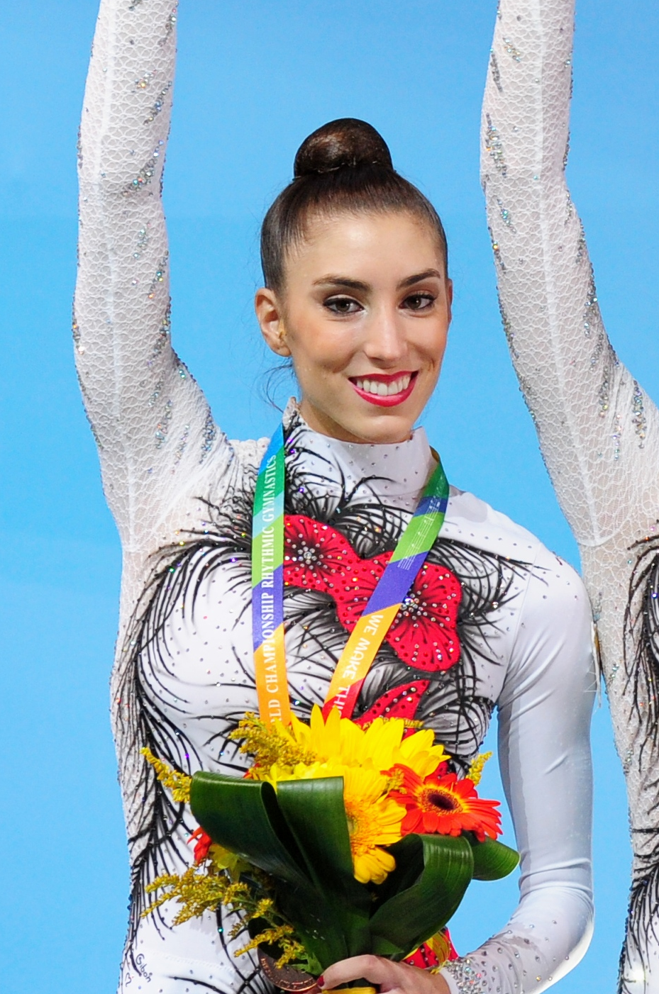 Sandra Aguilar con la medalla de bronce en el podio de la final de 3 pelotas y 2 cintas en el Campeonato Mundial de Kiev en 2013.